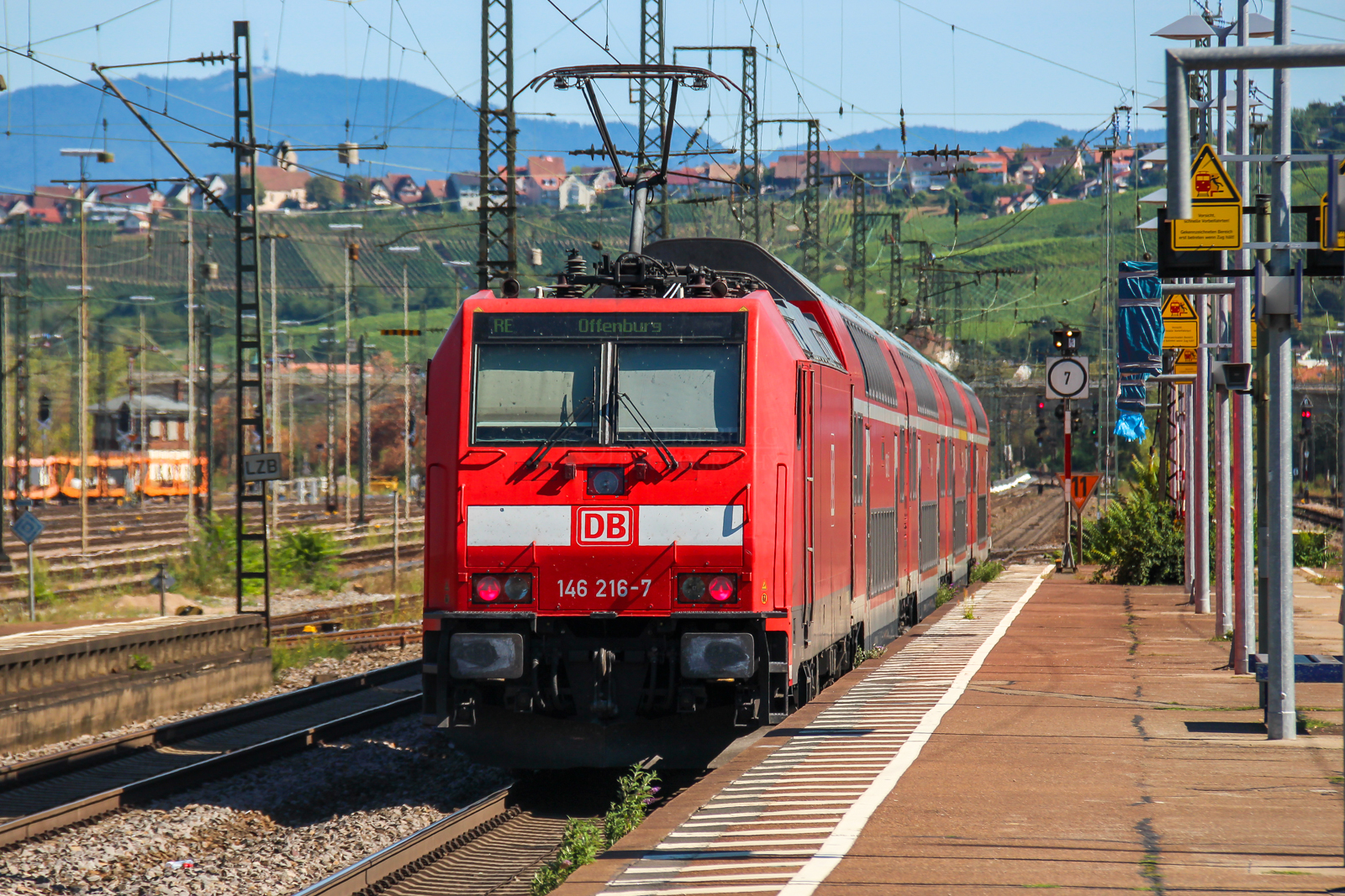 RegionalExpress von Basel nach Offenburg am 12.08.2018